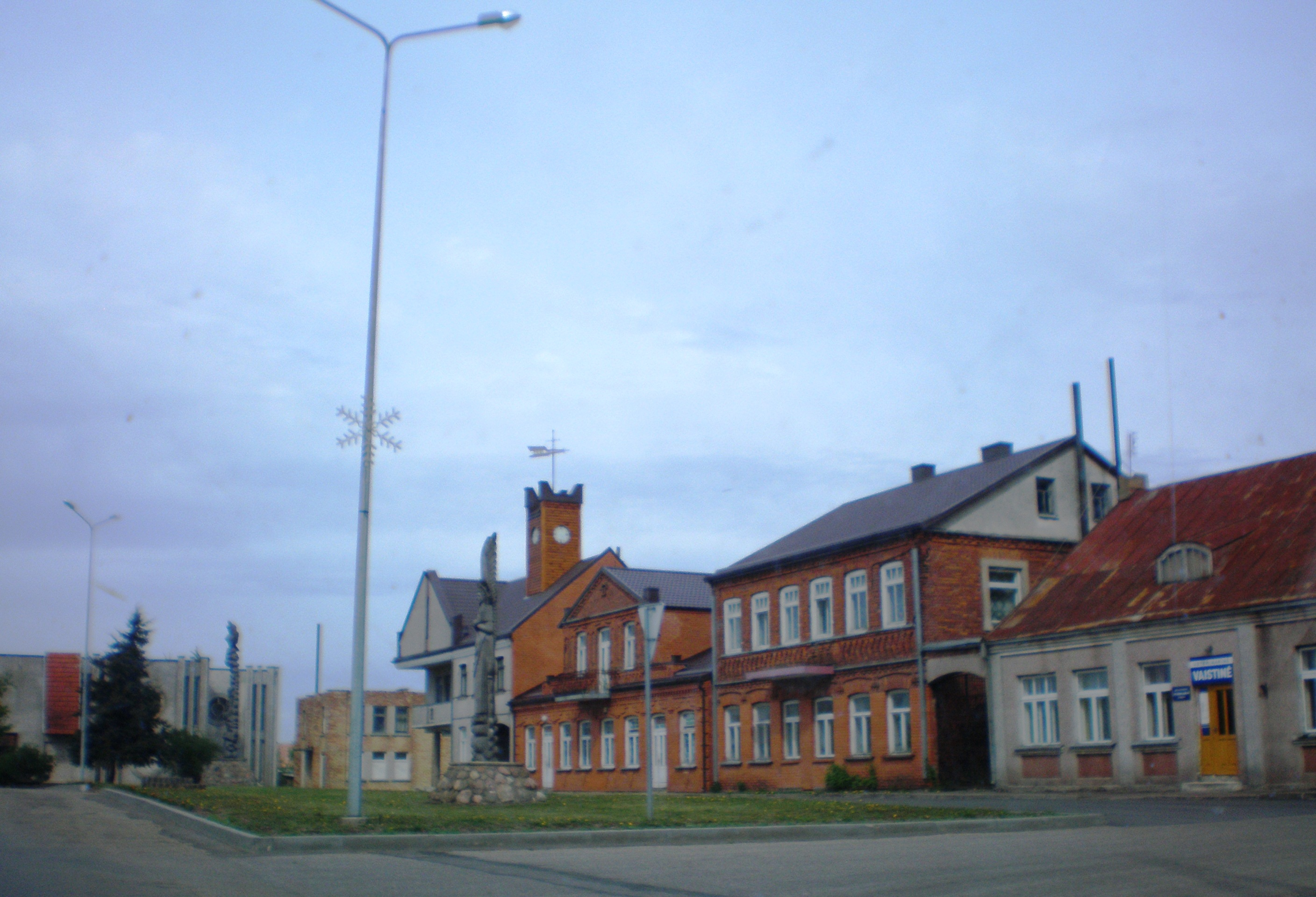 Edificio viejo en Krakes, Lituania